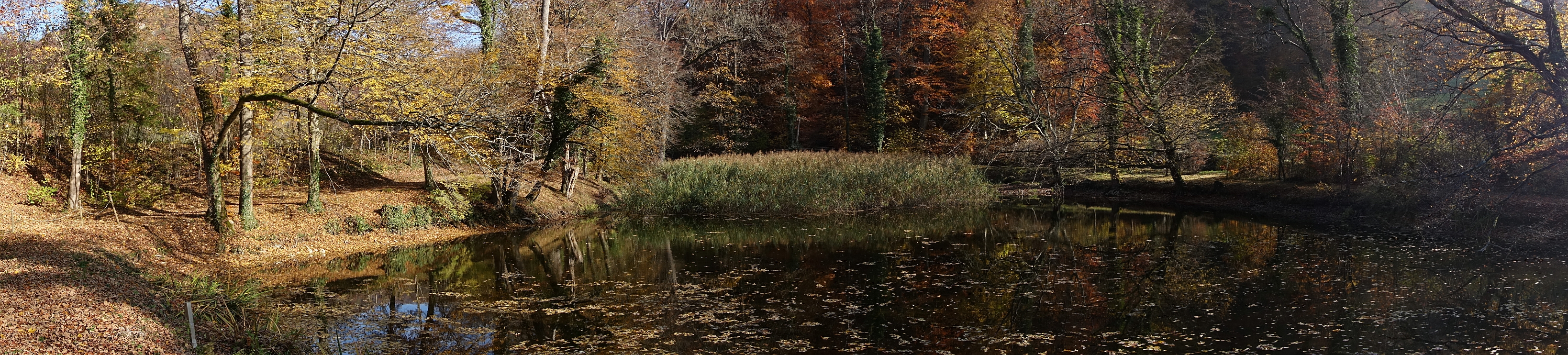 Bereits bei der Eröffnung der Ermitage 1785 und dann wieder ab 1812 bis etwa 1860 fuhren Boote auf dem Weiher. Die Besucher wurden von Bediensteten über den Weiher gerudert. Der Name lac de Tempé verschwand, die Weiher wurden nun Forellenweiher (hinterer Weiher), Karpfenweiher (mittlere Weiher) und Hechtweiher (unterer Weiher) genannt.